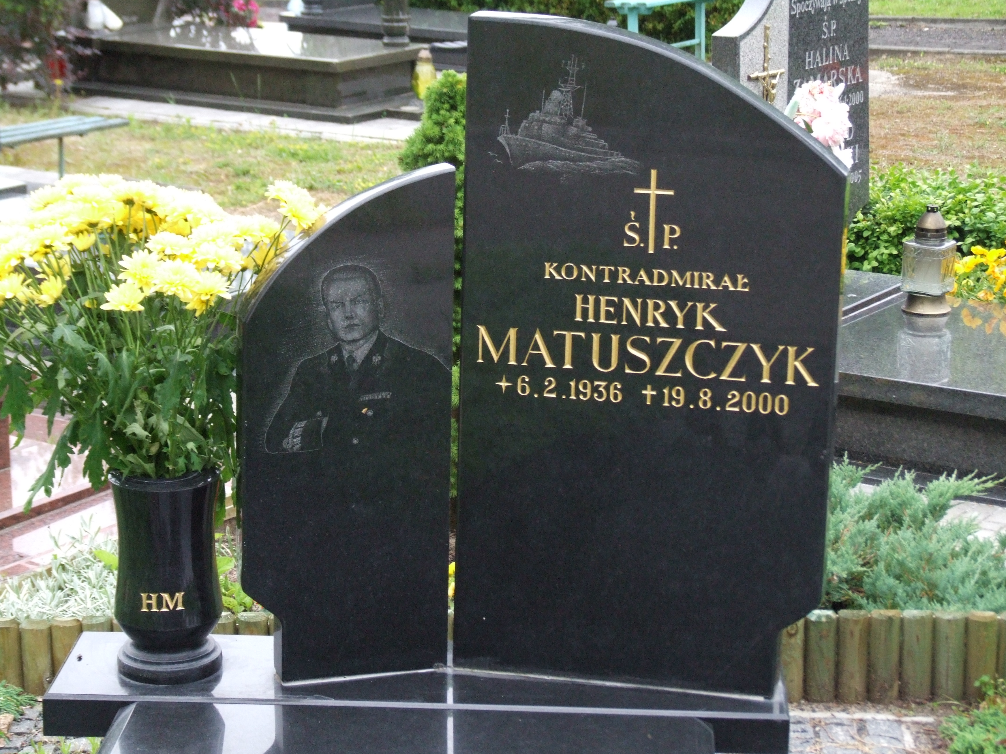 Gdynia-Oksywie Cmentarz Marynarki Wojennej